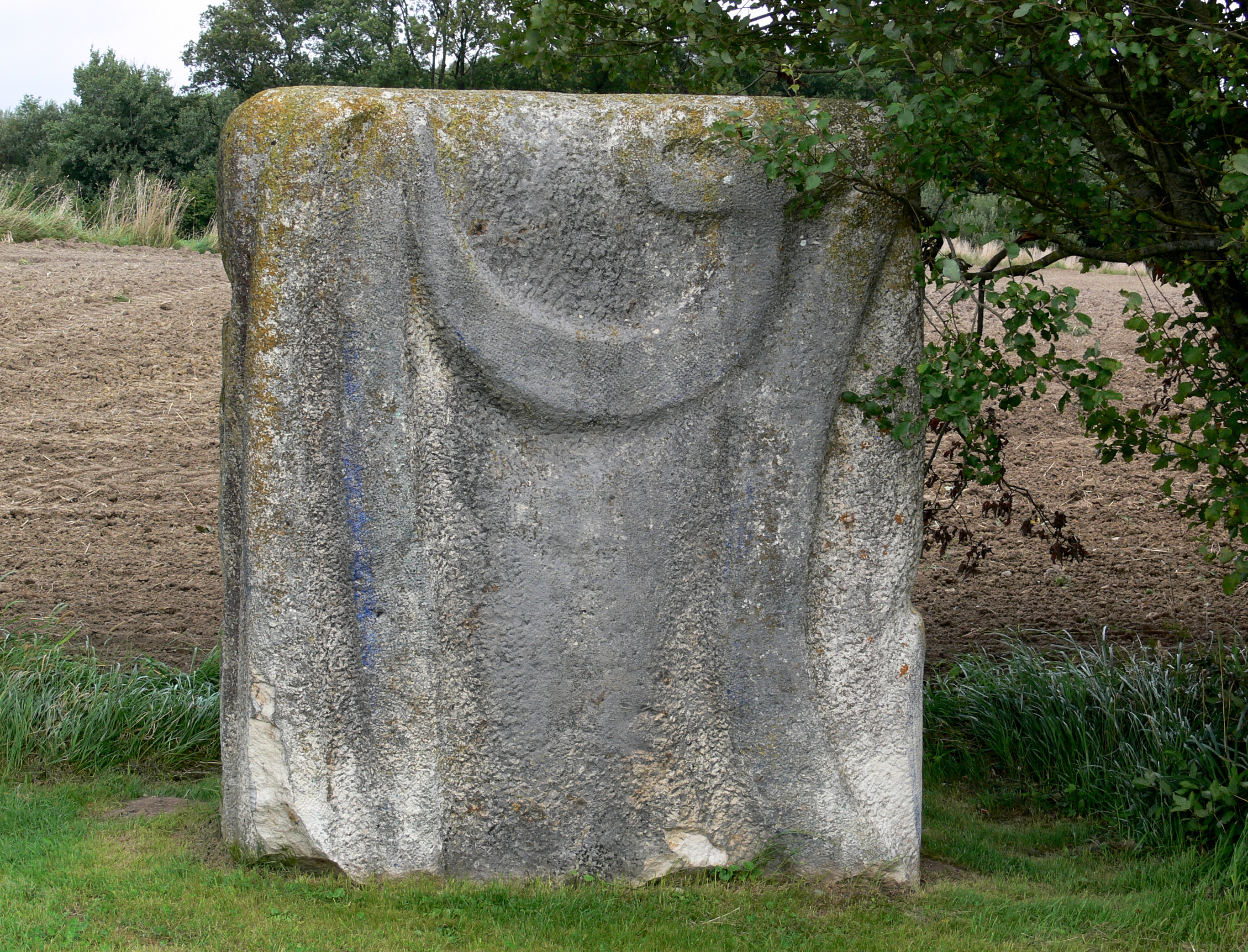 Skulpturenfeld Oggelshausen, Landkreis Biberach Bildhauersymposium 1969 Maria Biljan-Bilger: (ohne Titel)